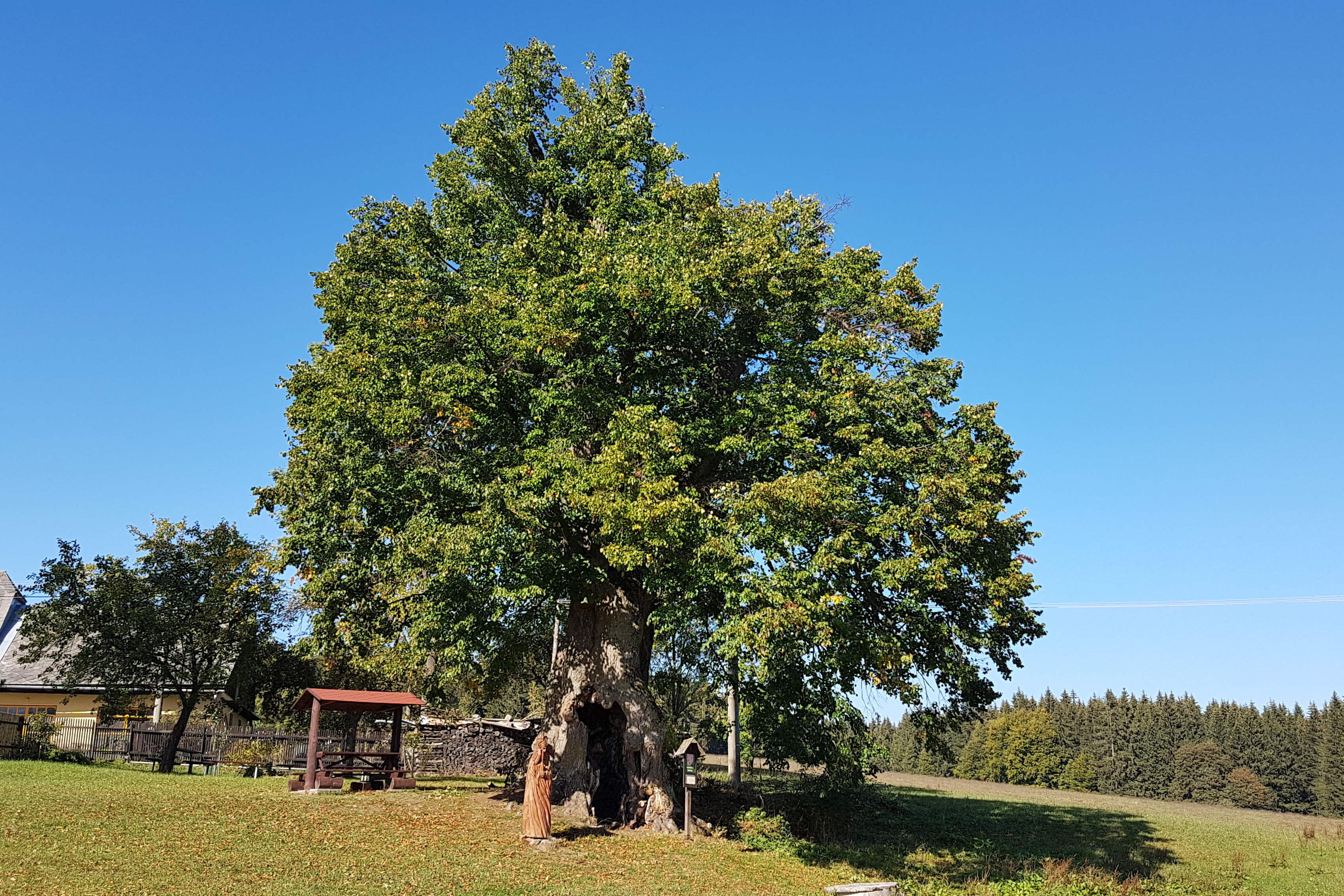 Dvorská lípa, obec Kuklík, osada Chobotský Dvůr